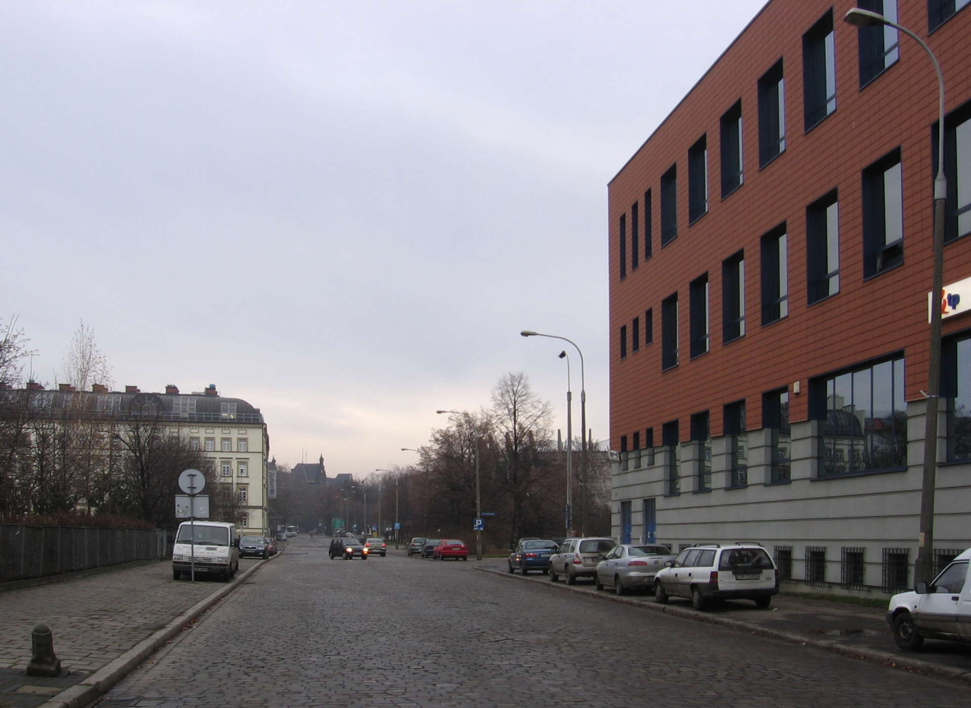 Ulica Jana Ewangelisty Purkyniego we Wrocławiu: widok na wschód ze skrzyżowania z ul. Janickiego. Po prawej pomarańczowy budynek Telekomunikacji Polskiej, dalej za drzewami widoczny fragment rotundy Panoramy Racławickiej; w osi ulicy, z wieżyczką, widoczny budynek Muzeum Narodowego; po lewej duży jasny budynek hotelu SAS Radisson,; bliżej ogrodzenie szkoły.